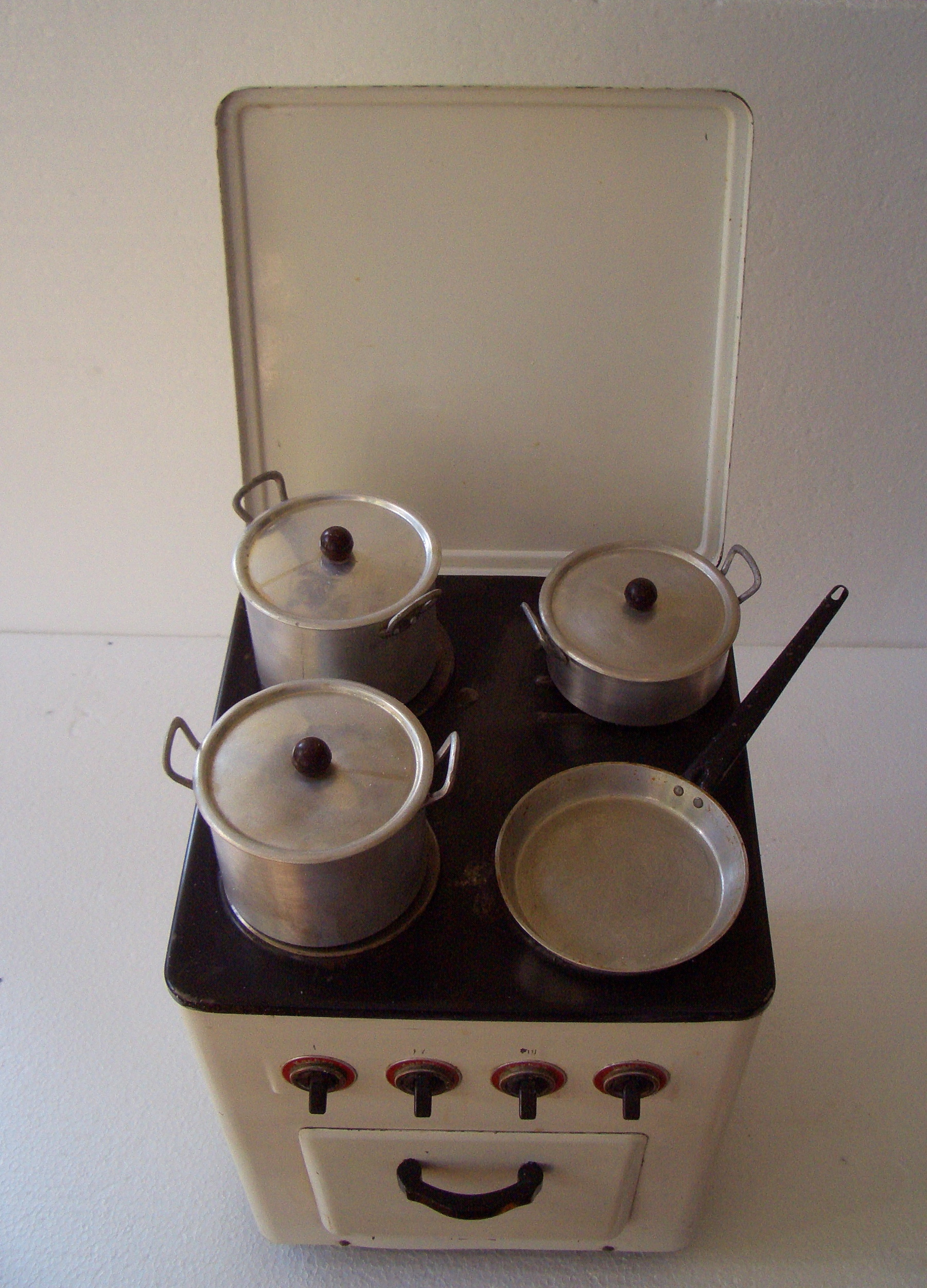 elektrischer Puppenherd, Anfang 1960er, Westdeutschland; doll's stove, early 1960s, Western Germany